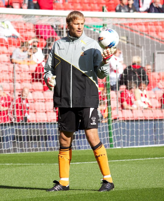 Jussi Jaaskelainen